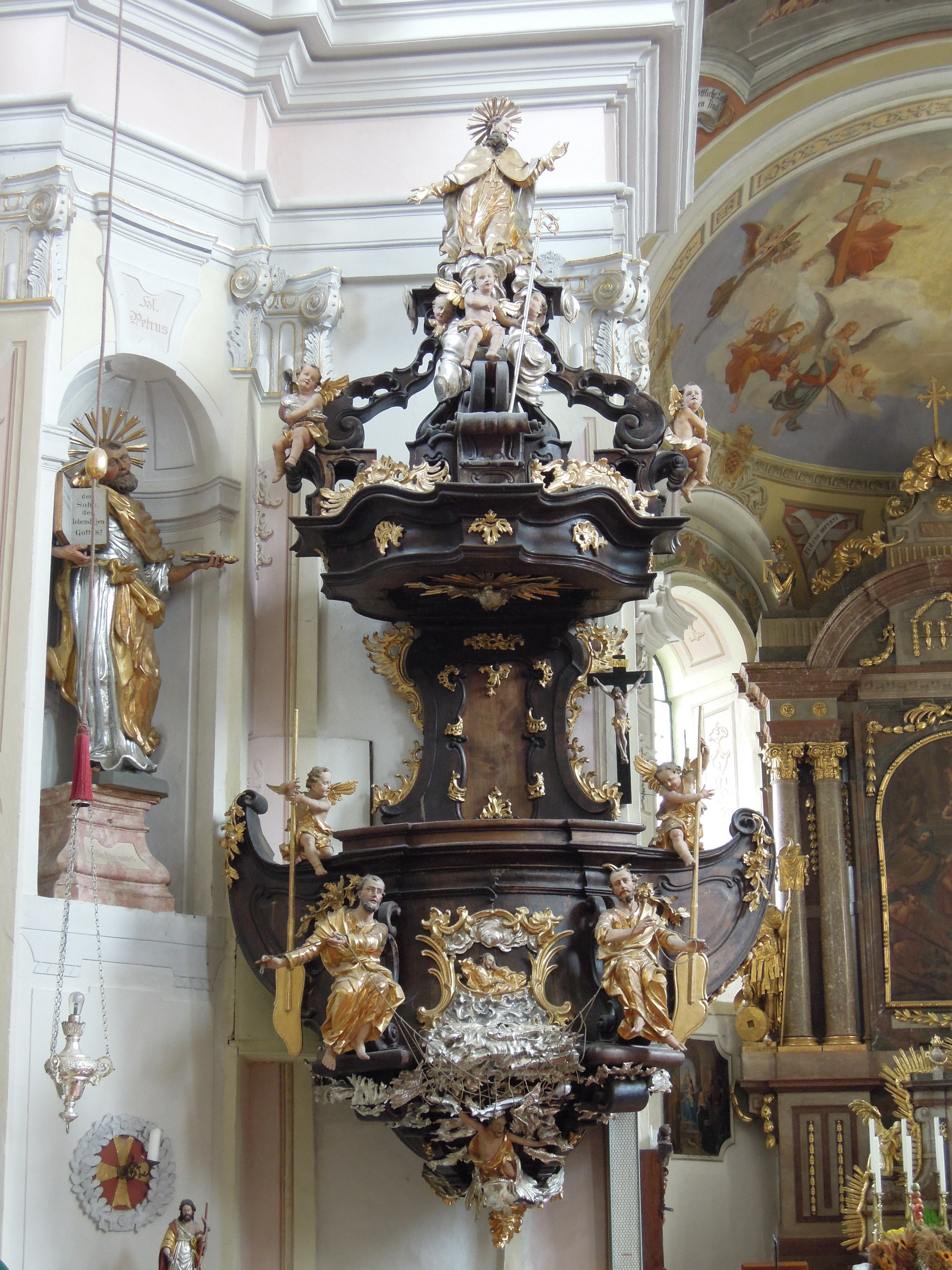 Kath. Pfarrkirche hl. Laurentius